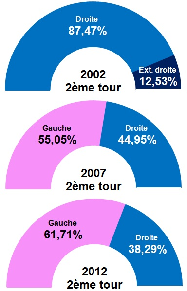 Résultats 2nds tours présidentielles Lannemezan